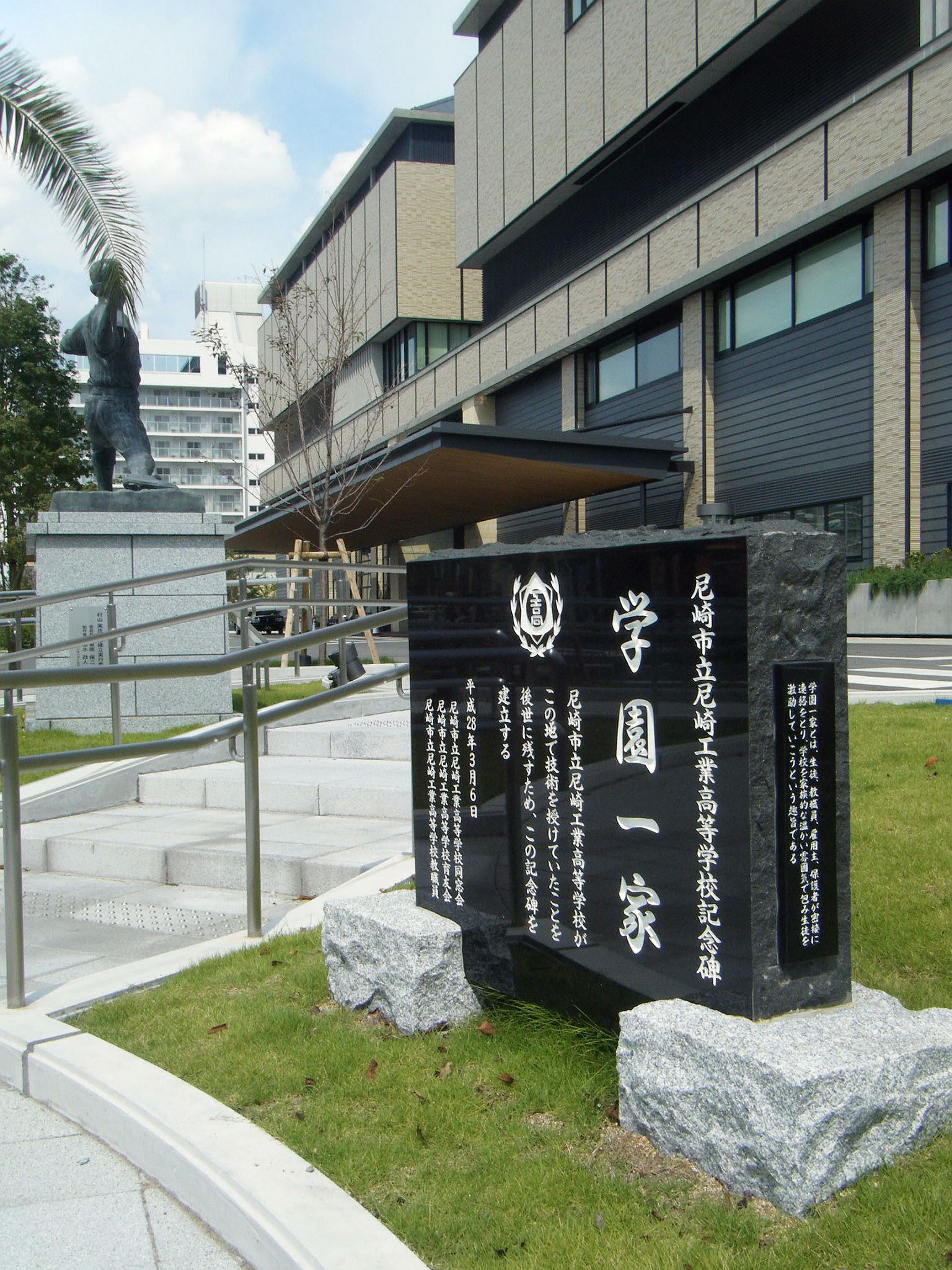 兵庫県立尼崎総合医療センター敷地に建てられた、尼崎市立尼崎工業高等学校の記念碑「学園一家」